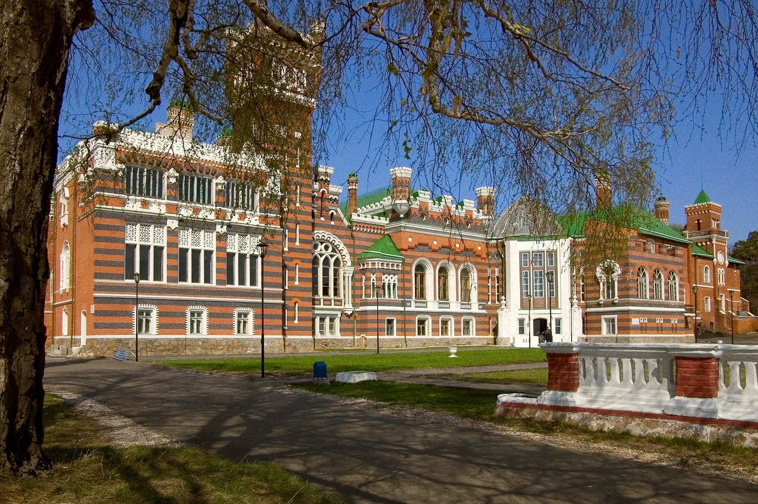 Замок графов Шереметевых в Юрино